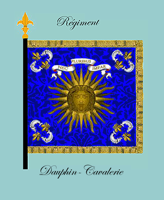 Standarte des Kavallerieregiments „Dauphin-Cavalerie“ Königreich Frankreich 1668-1791